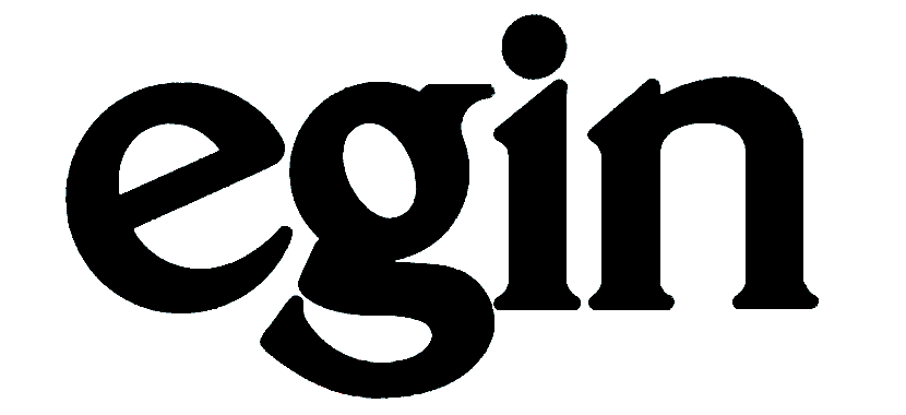 Mancheta del diario Egin.